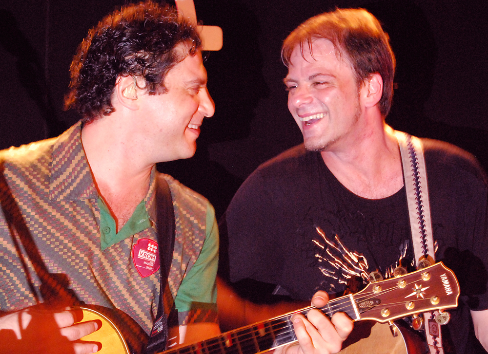 Roberto Frejat e Rodrigo Santos, ambos integrantes da banda Barão Vermelho se apresentando em show de carreira solo do Rodrigo.